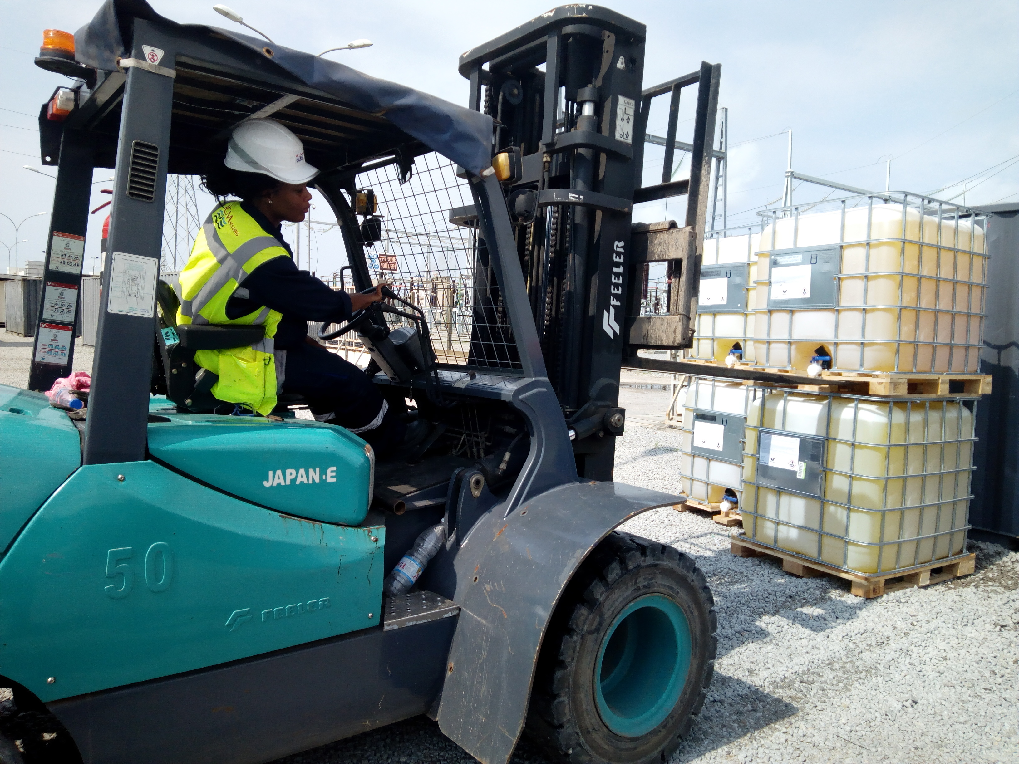 Une femme cariste manœuvrant un chariot élévateur dans une centrale électrique à Abidjan. This is an image of "African people at work" from Ivory Coast